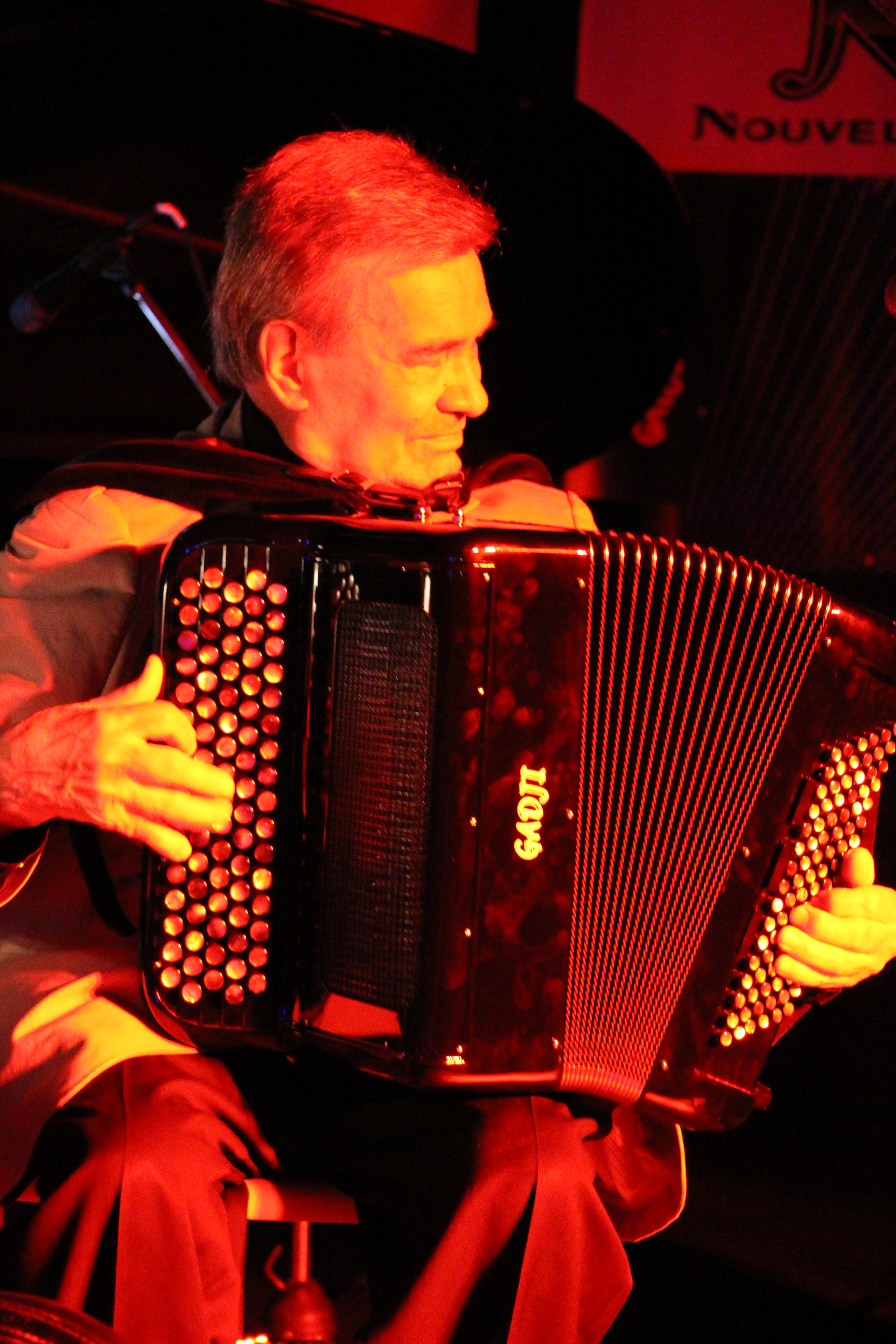 Marcel Azzola en concert à Nozières le 13 juin 2005